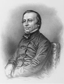 French jurist and politician Édouard Laboulaye (Édouard Lefebvre de Laboulaye) (1811-1883)